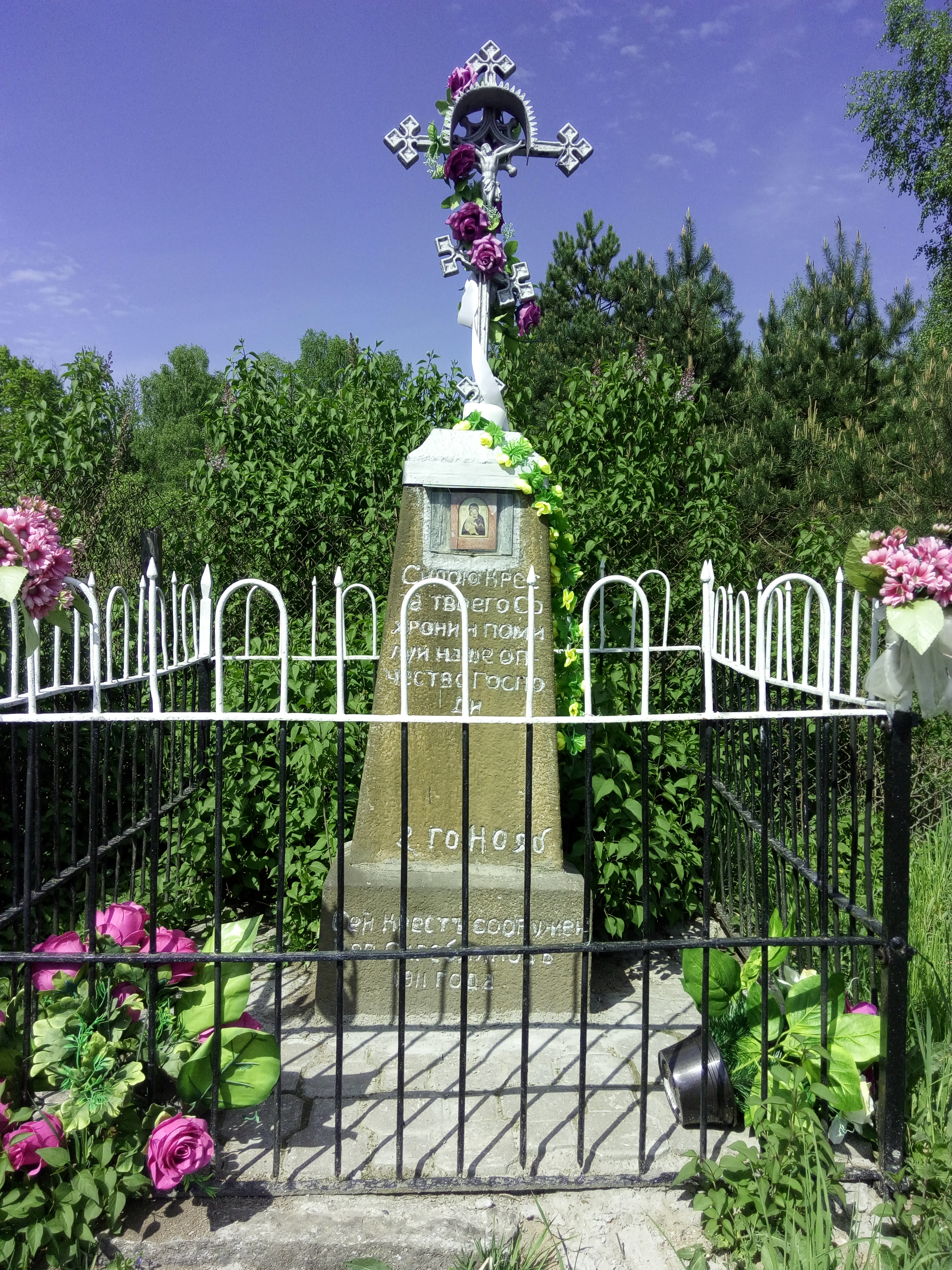 Kapliczka z prawosławnym krzyżem w Skroblakach.